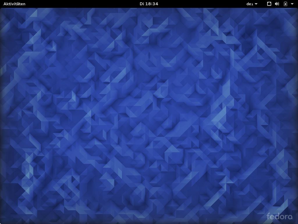 Fedora 23 mit GNOME 3.18.1